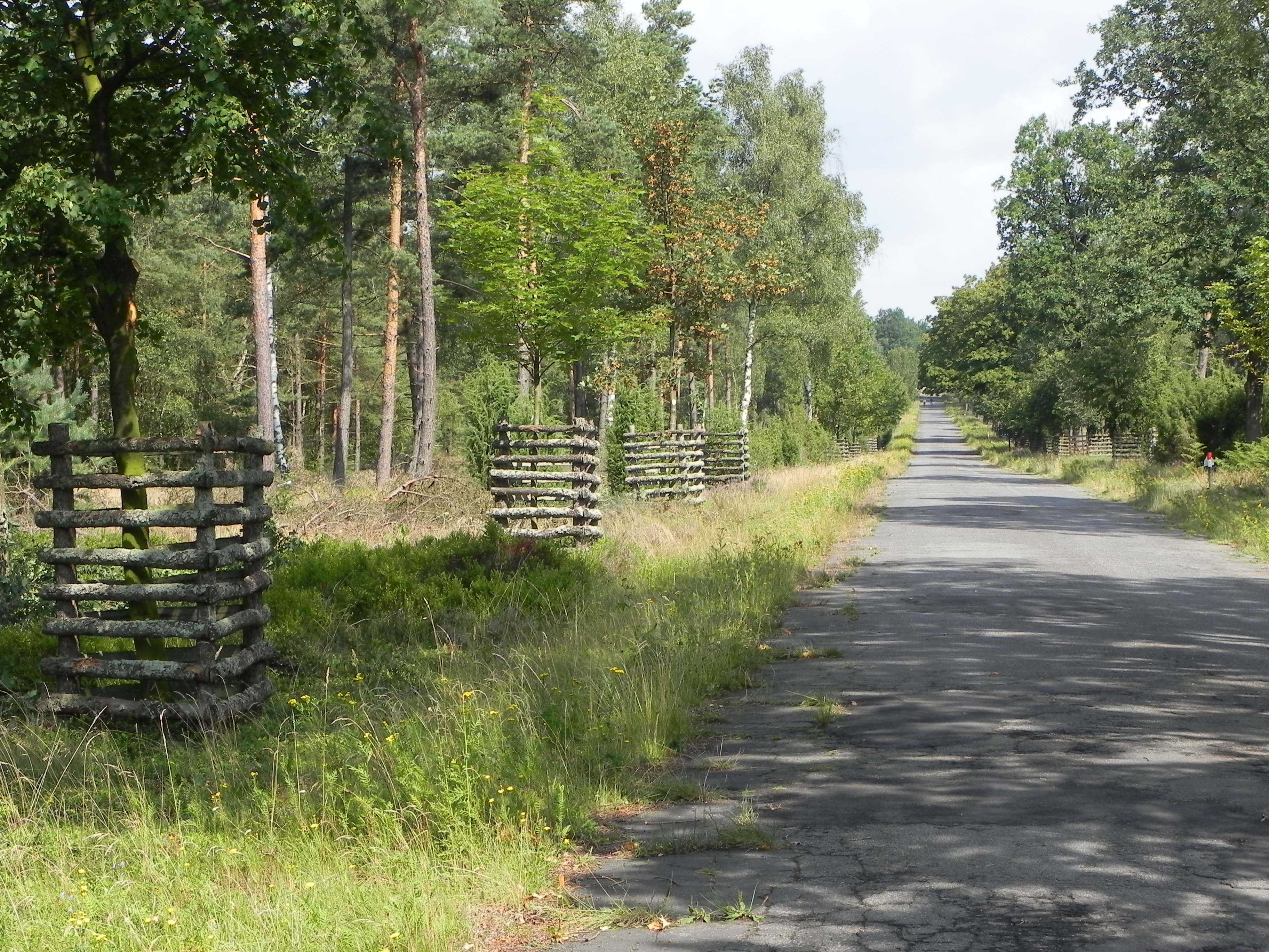 Abschnitt der ehemaligen Reichsstraße 3, heute Bundesstraße 3, im Nordostteil des Truppenübungsplatzes Bergen